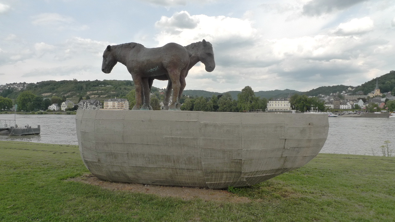 Johannes Brus: „2 Pferde und ein Boot“ (2008) – Skulpturenufer Remagen